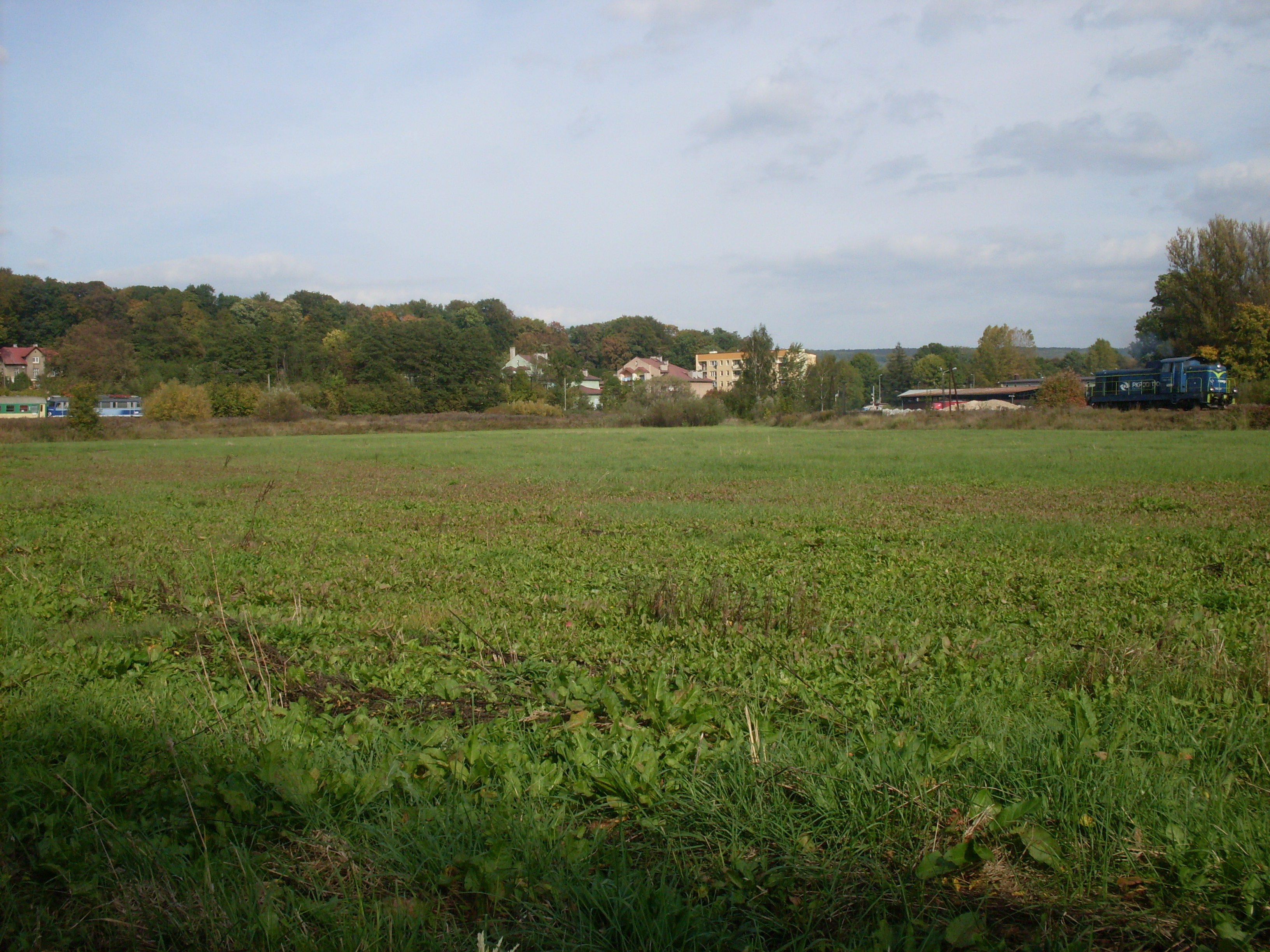 Krzeszowice .Tereny dawnego hipodromu Potockich, widokod str. pd. pomiędzy linią kolejową Kraków-Katowice, bocznicą kolejową do kamieniołomu Zalas oraz (niewidocznych na zdjęciu) rzekami Filipówką i Dulówką